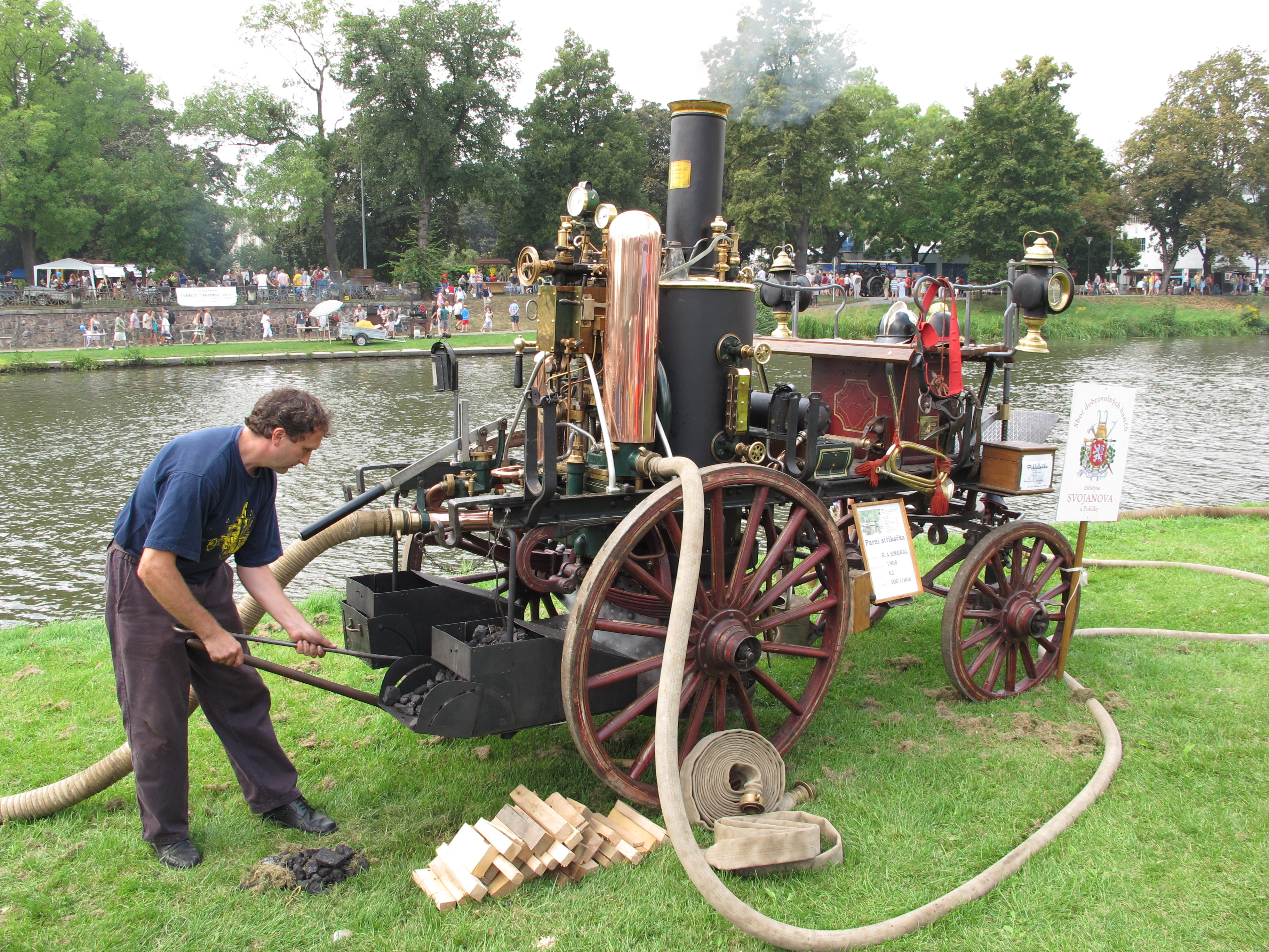 Historical fire engines of the Czech Republic